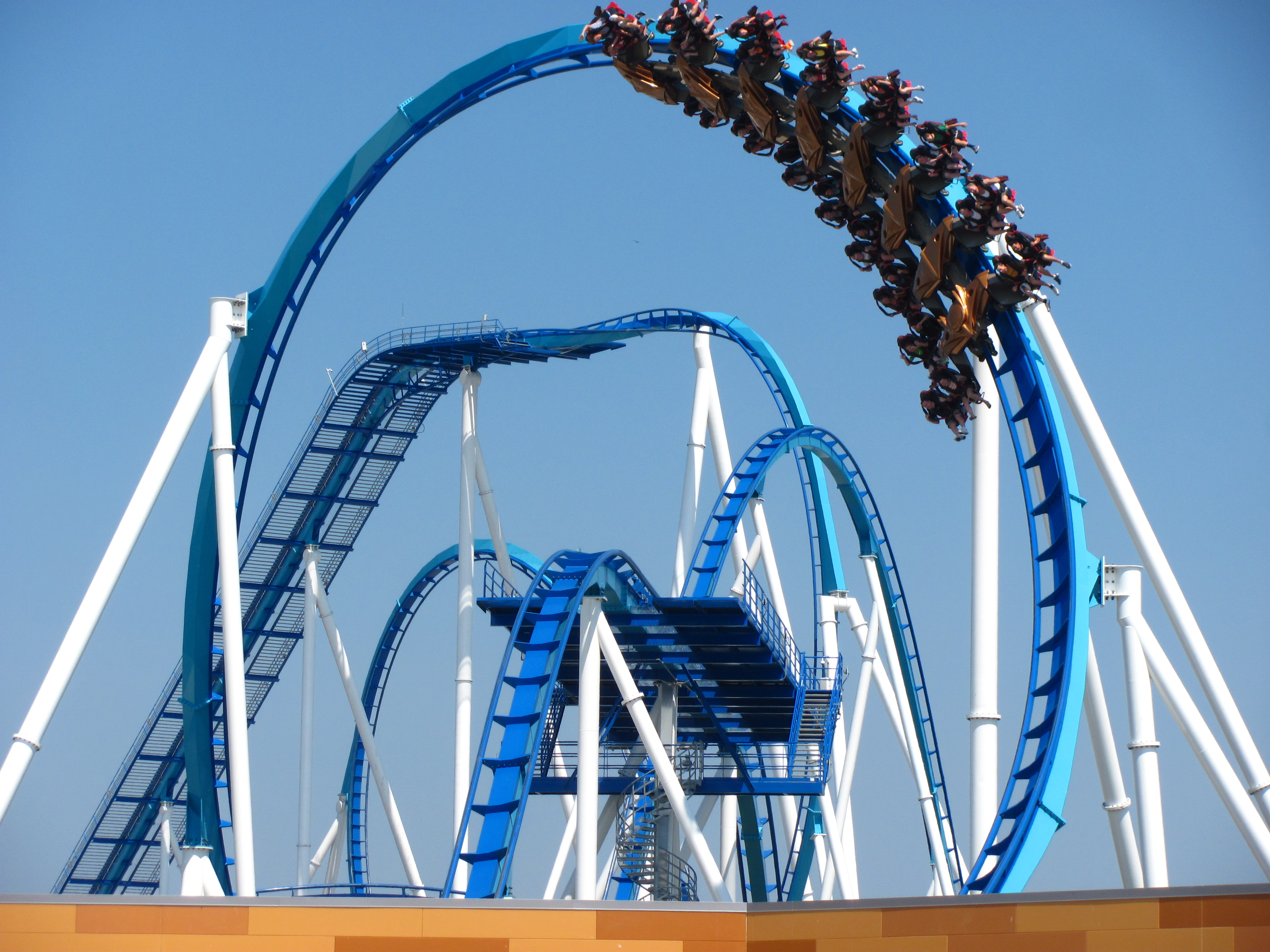 Cedar Point 004